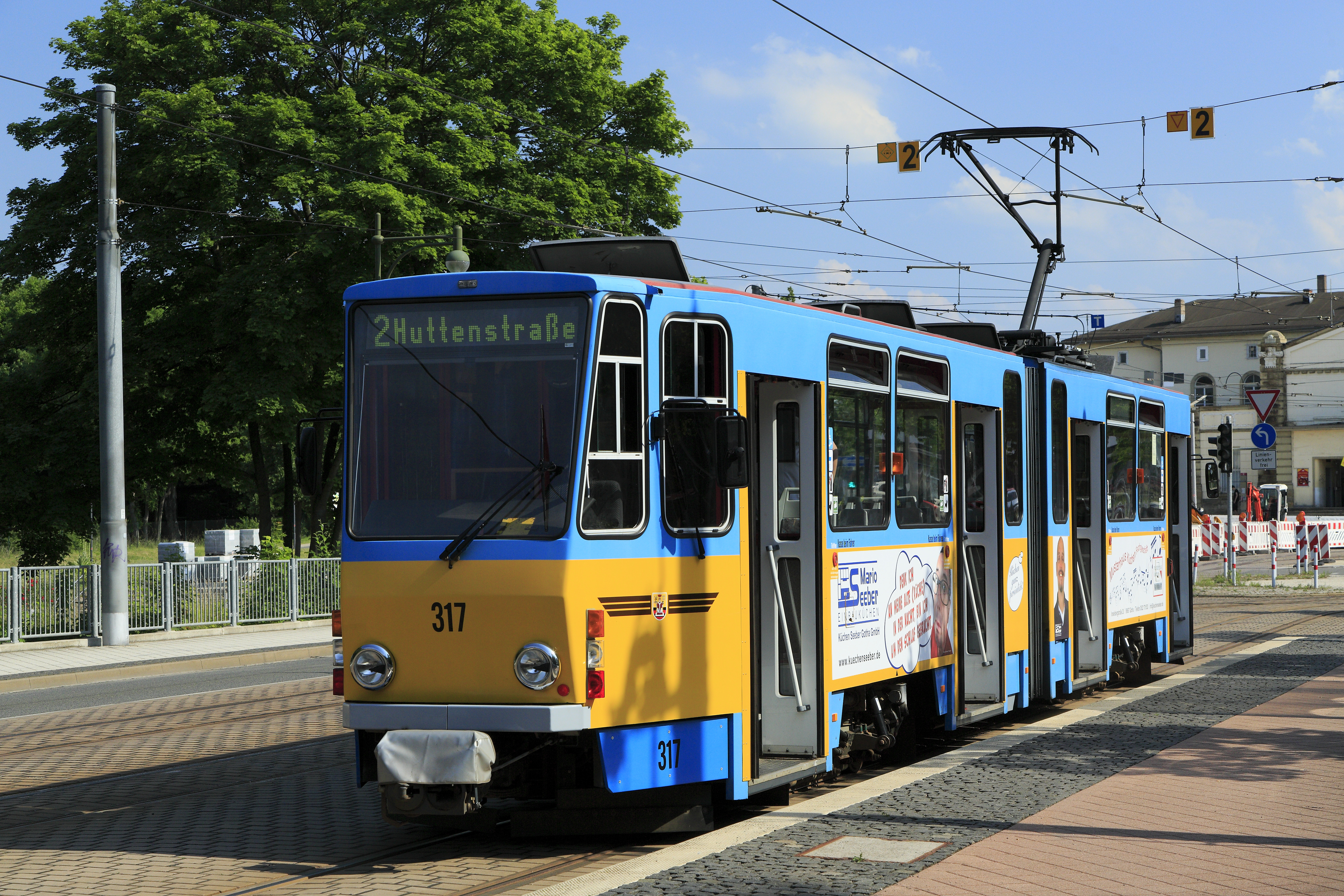 Der ET 317 der Straßenbahn Gotha am Ankunftsbahnsteig Gotha Hbf, B-Ende mit Türseite. Der Wagen 317 ist einer von zwei unechten Zweirichtungswagen, die durch den Einbau eines vollwertigen Führerstandes am B-Ende entstanden. Üblicherweise verkehren sie zwischen Gleisdreieck und Walthershausen, doch im Sommer 2017 war die Strecke zwischen Gartenstraße und Bahnhof Gotha nur eingleisig befahrbar. Um auf Bauweichen verzichten zu können, wurde im Zug der Bahnhofs- und Friedrichstraße eingleisiger Pendelbetrieb auf dem Richtungsgleis zum Bahnhof eingerichtet. Die regulären Abfahrtsbahnsteige am Bf Gotha (Hbf) wurden nicht bedient, die Züge kehrten hier am stadtseitig gelegenen Ankunftsbahnsteig.Das umgebaute B-Ende erscheint wie ein komplett gespiegeltes A-Ende.